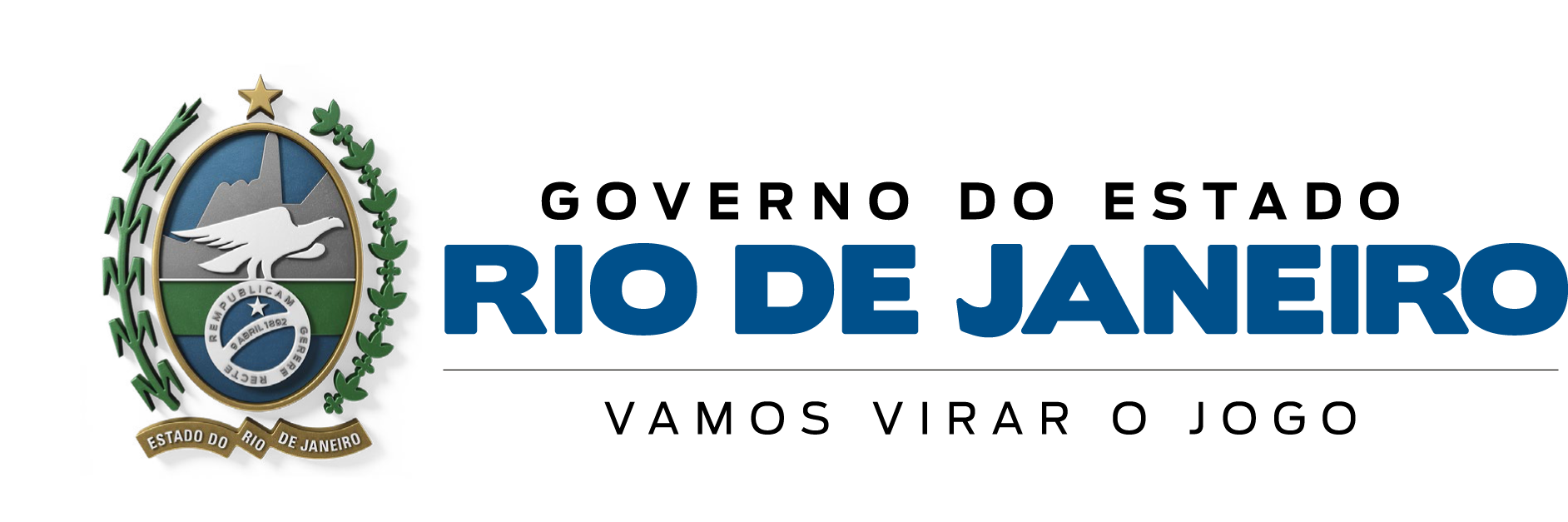 Logo governo do rj 2019